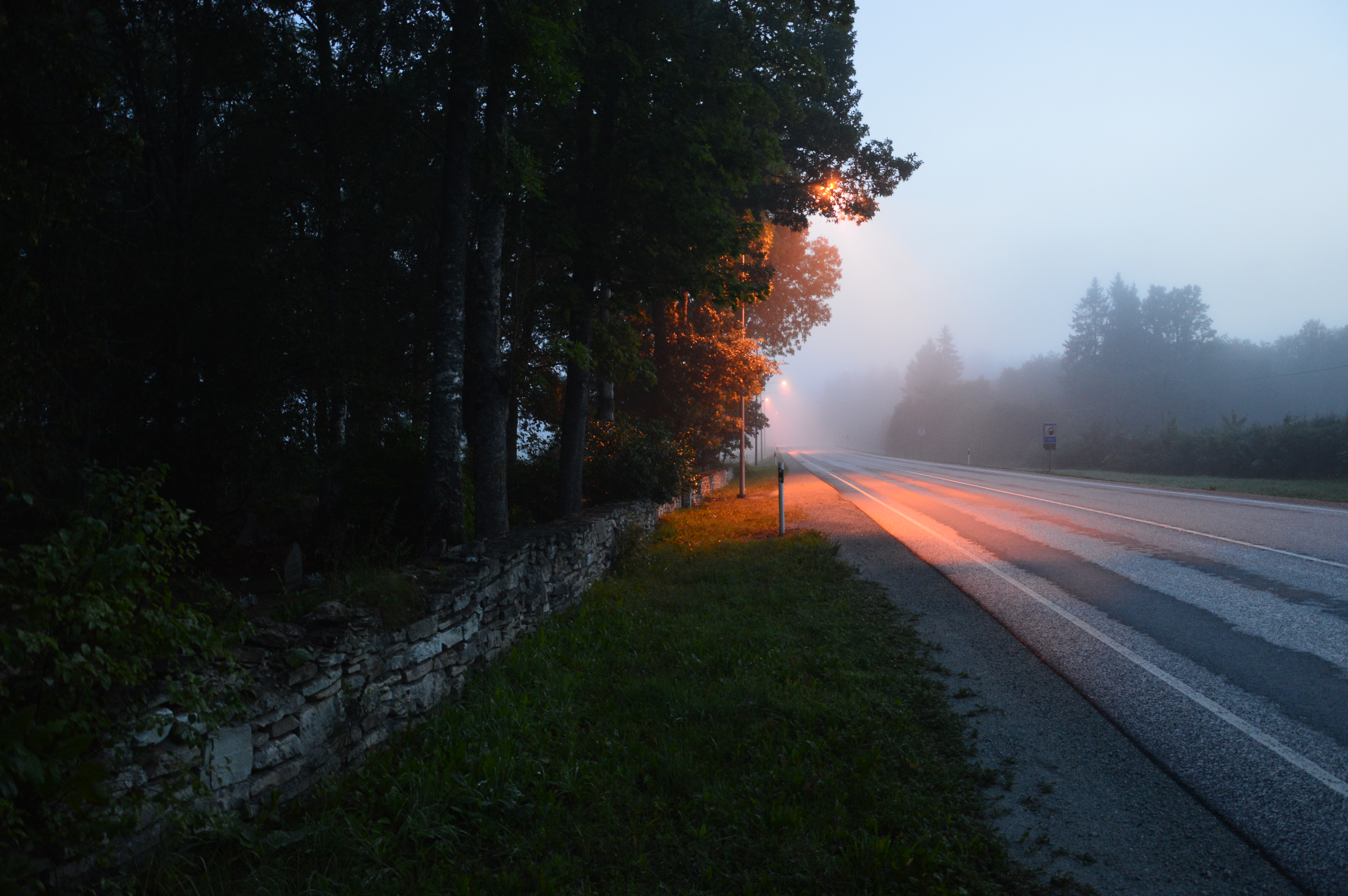 Anna kirikuaia piirdemüür varahommikul